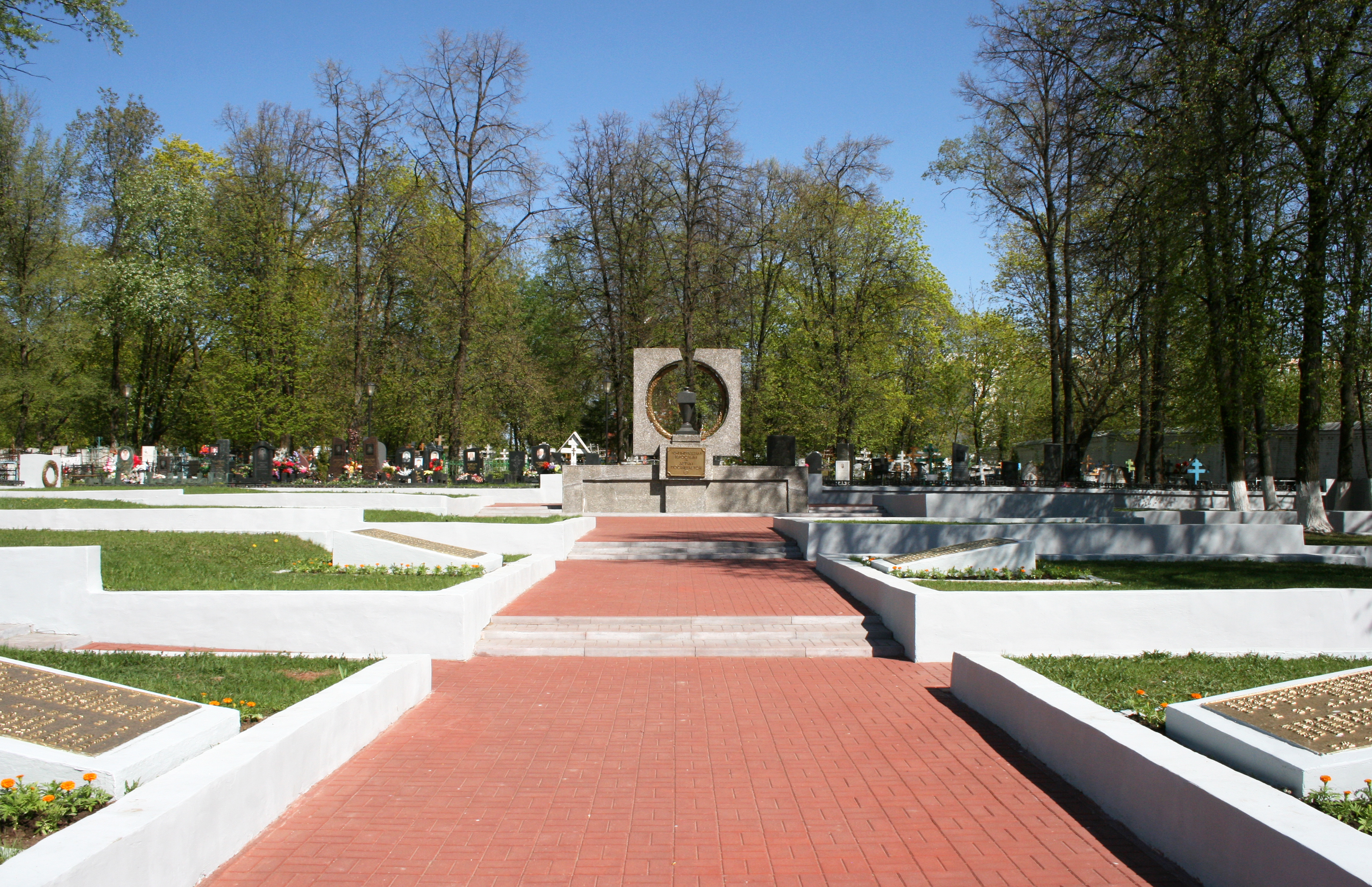 Мемориал ленинградцам-блокадникам на Скорбященском кладбище города Рязани